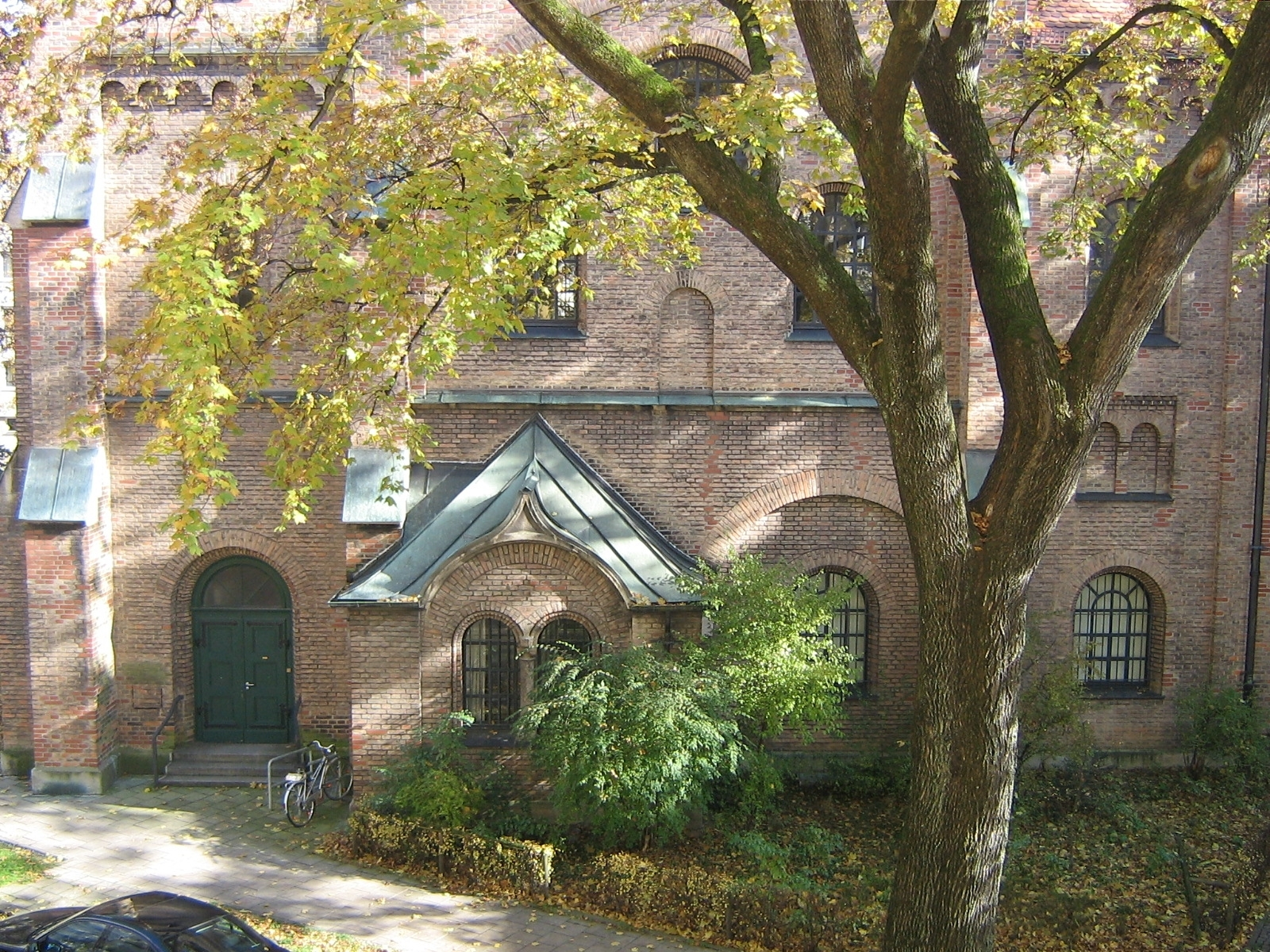 Die Westfront der St.Johanneskirche am Preysingplatz in München (D). Aufgenommen mit einer Canon Power Shot A410 Camera vom Pfarrhaus, Preysingplatz 1, aus.